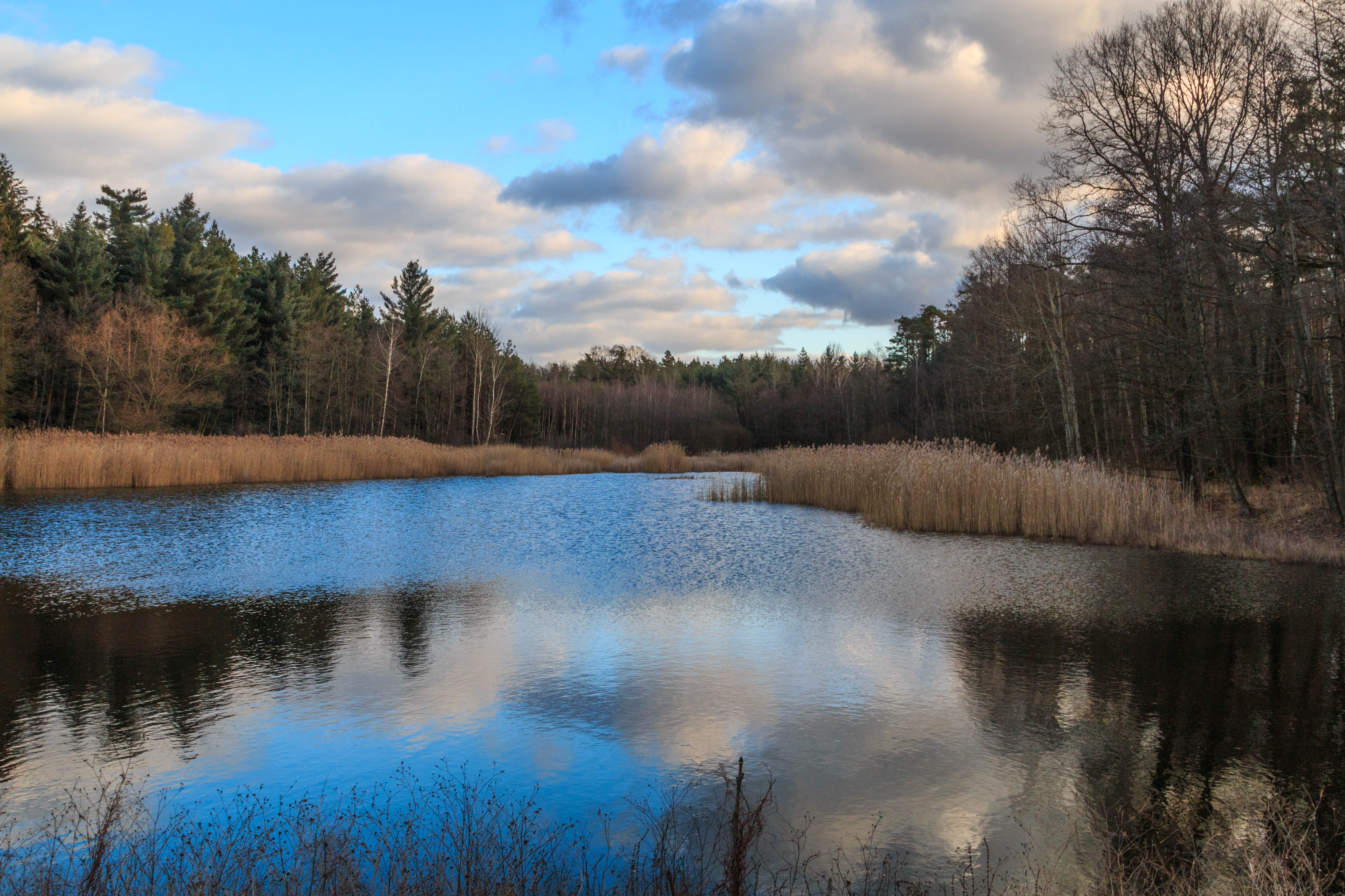 rybník Horní Flajšar u obce Štít